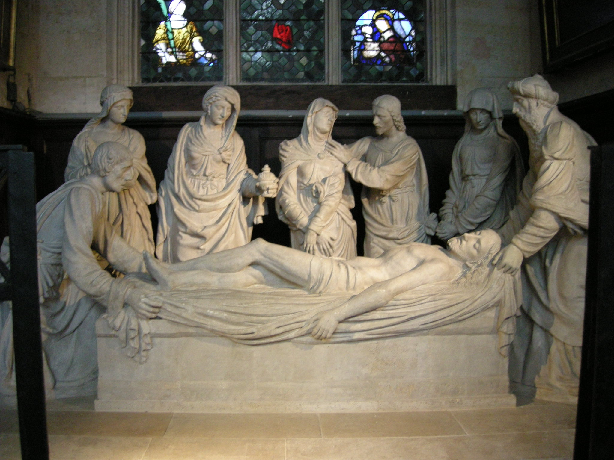 Mise au tombeau, église Saint-Étienne-du-Mont (Paris), groupe sculpté grandeur nature terre cuite peinte. 4e quart XVIe siècle.Ce groupe provient de l'ancienne église de Saint-Benoît.